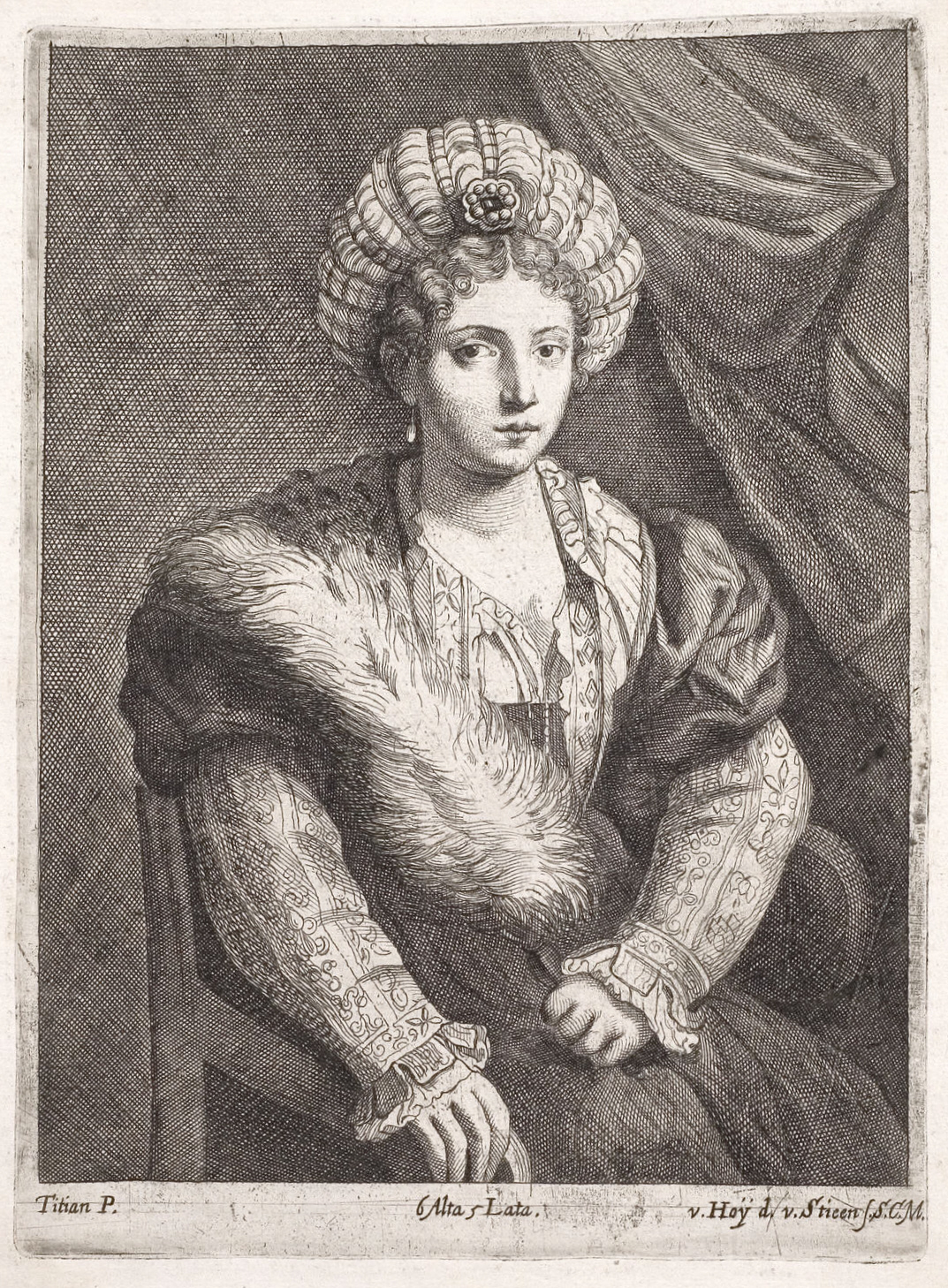 Grafik aus dem Klebeband Nr.13 der Fürstlich Waldeckschen Hofbibliothek Arolsen Aus dem Theatrum pictorium: Reproduktion eines Gemäldes von Titian: Portrait der Isabella d'Este